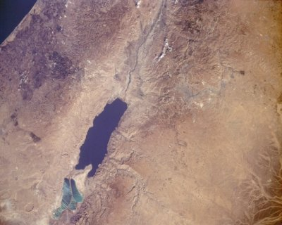 Dode zee